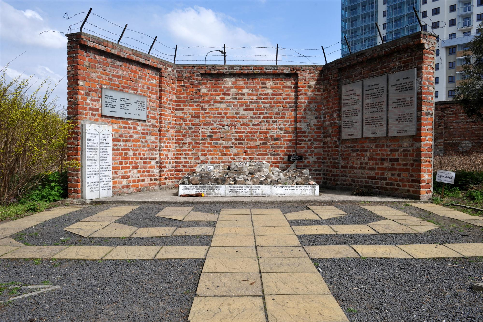 Pomnik Pamięci Dzieci – Ofiar Holokaustu